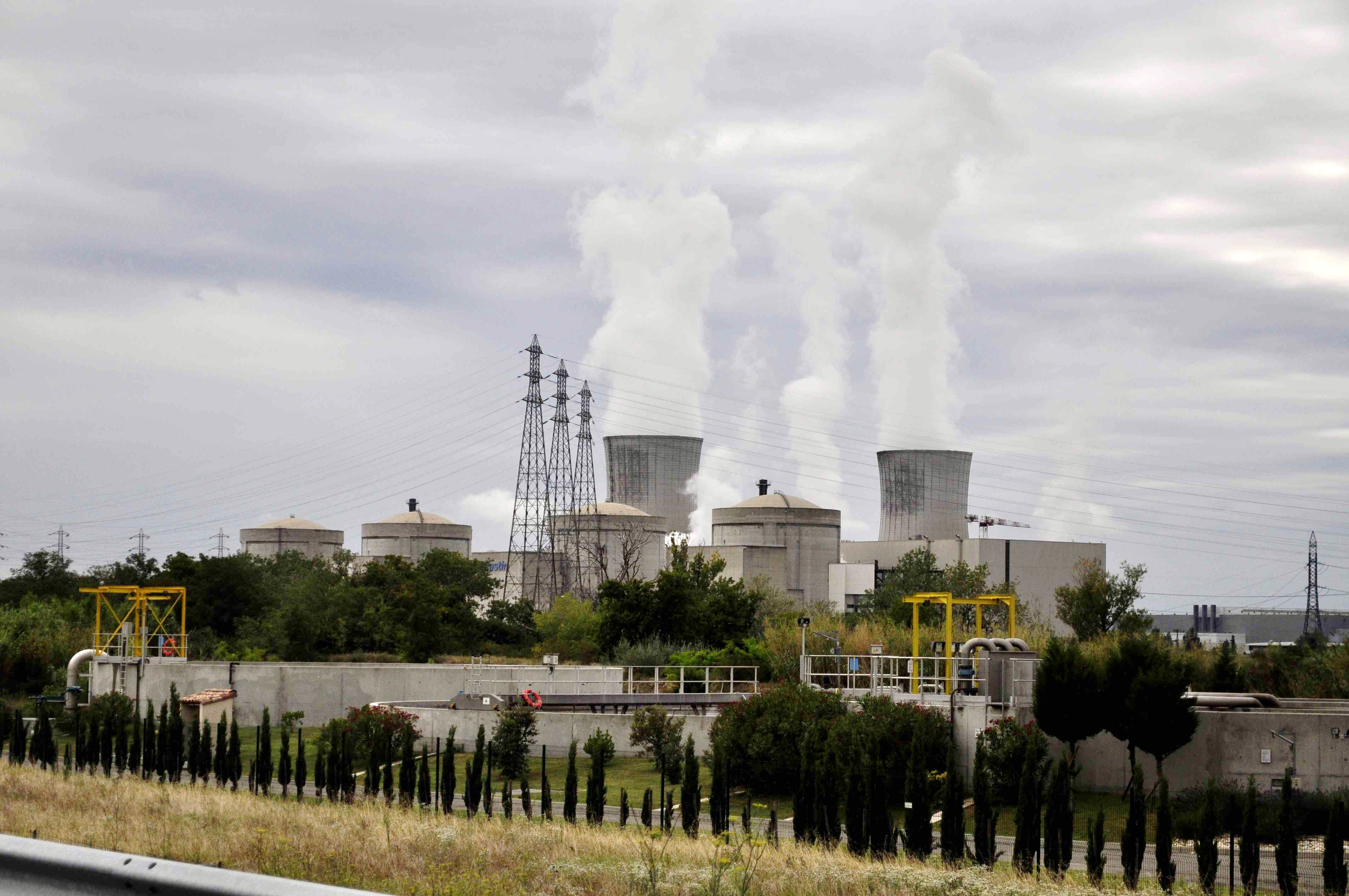 Site nucléaire du Tricastin.